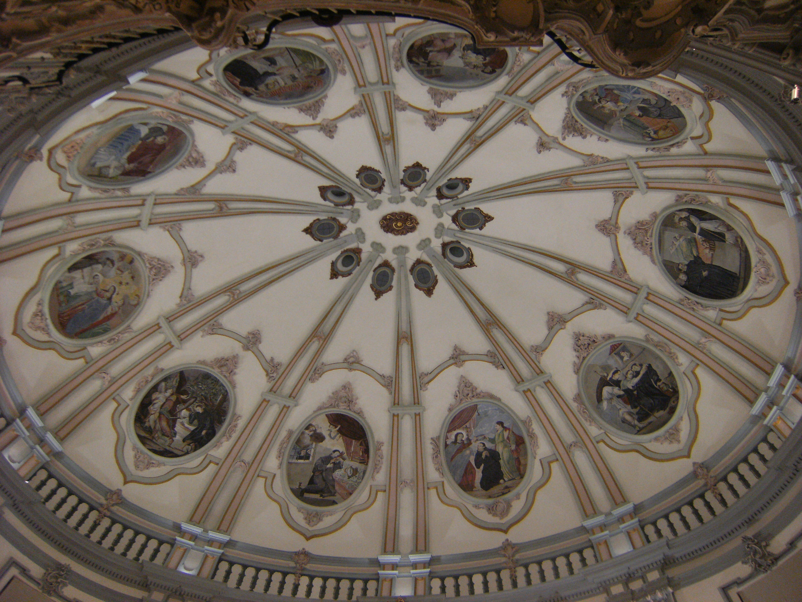 Interior de la cupula de San Juan de Dios en Murcia, España. Siglo XVIII